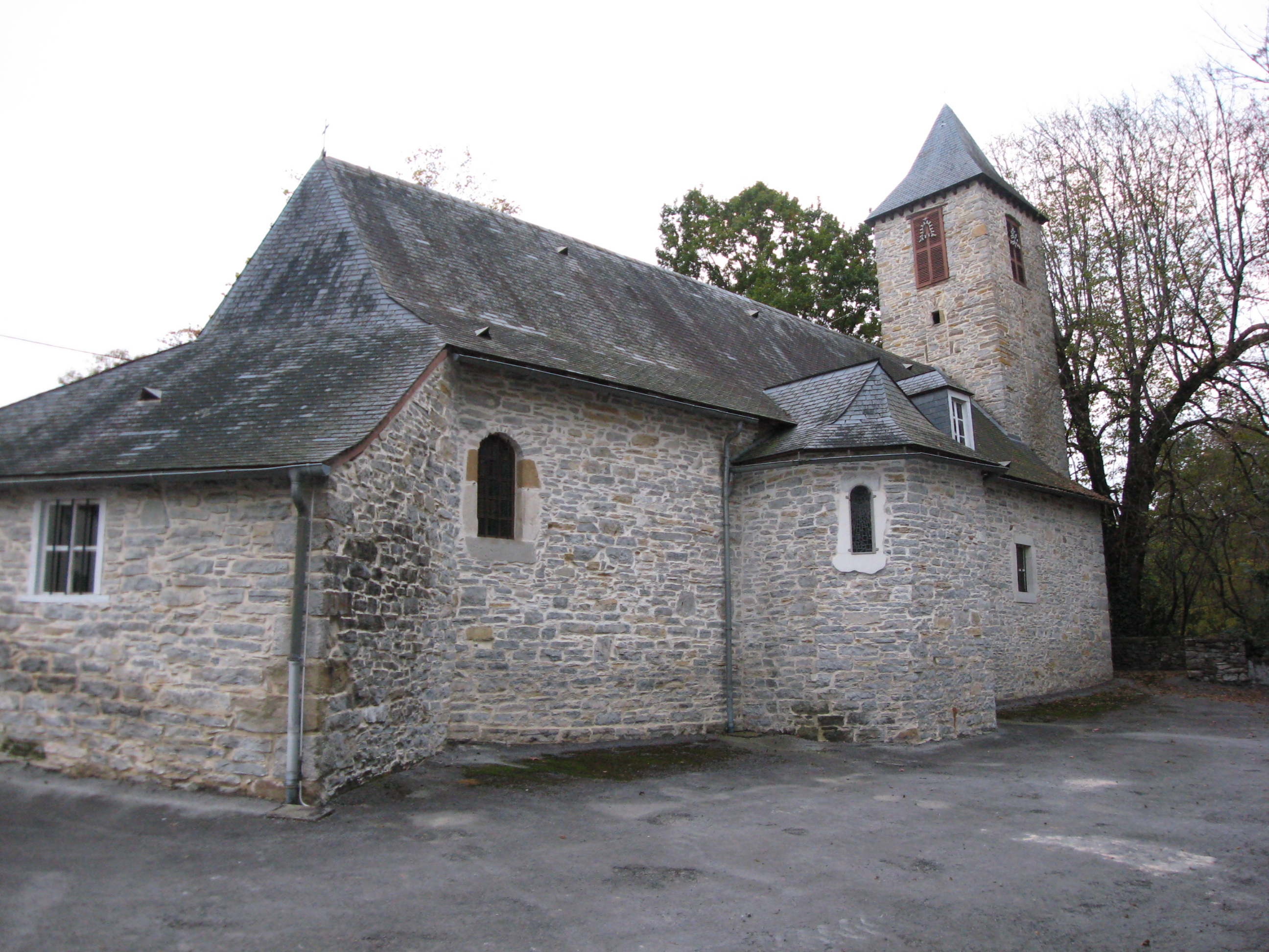 Eglise de Haut-de-Gan (Pyrénées).